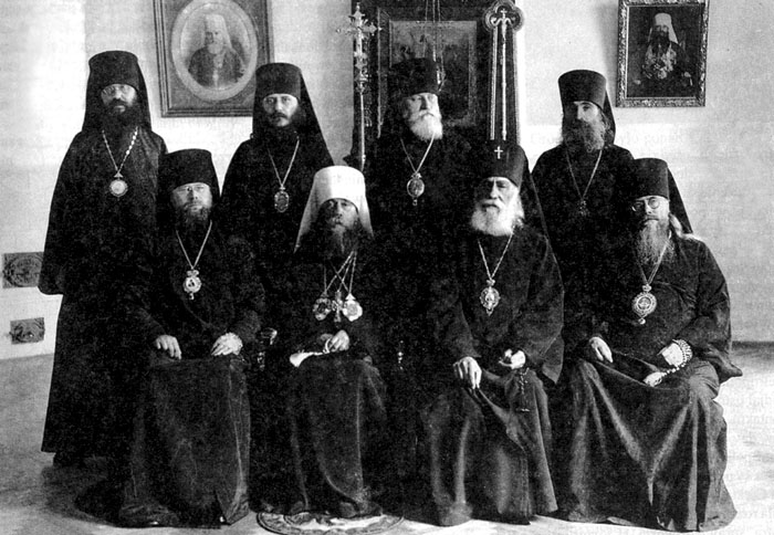 Sobór biskupów Polskiego Autokefalicznego Kościoła Prawosławnego. Warszawa, 16 lipca 1938 r. siedzą: arcybiskup poleski i piński Aleksander Metropolita Warszawski i całej Polski Dionizy arcybiskup wileński i lidzki Teodozjusz arcybiskup wołyński i krzemieniecki Aleksy stoją: biskup Antoni biskup grodzieński i nowogródzki Sawa biskup łucki Polikarp biskup ostrogski Simon